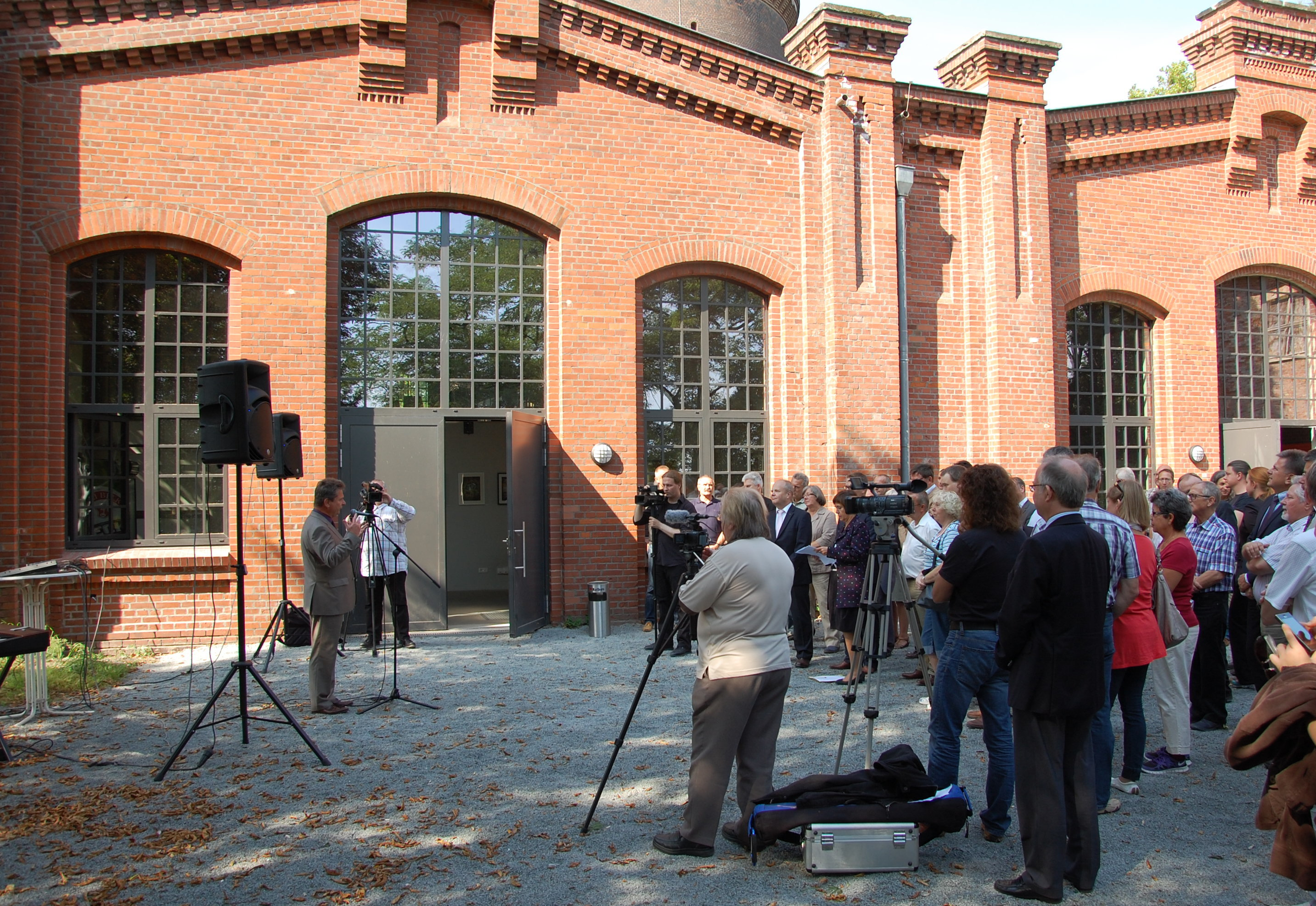 Einweihung des sanierten Salbker Wasserturms